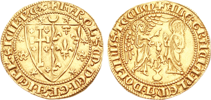 Italia. Napoli: Carlo II d'Angiò. 1285-1309. AV Saluto d'oro (4,38 g). (Carlino) KAROL' DEI GRA IERL'M SICILIE REX, stemma di Gerusalemme e d'Angiò AVE GRACIA PLENA DOMINUS TECUM, Annunciazione; sotto giglio in vaso. CNI XIX pg. 15, 1; Pannuti 1. Italy. Naples, Charles II d'Anjou. 1266-1285. AV Saluto d'oro (4,38 g). (Carlino) KAROL' DEI GRA IERL'M SICILIE REX, coat-of-arms of Jerusalem and Anjou AVE GRACIA PLENA DOMINUS TECUM, The Annunciation; lily in vase below. CNI XIX pg. 15, 1; Pannuti 1; MEC 14, 682.